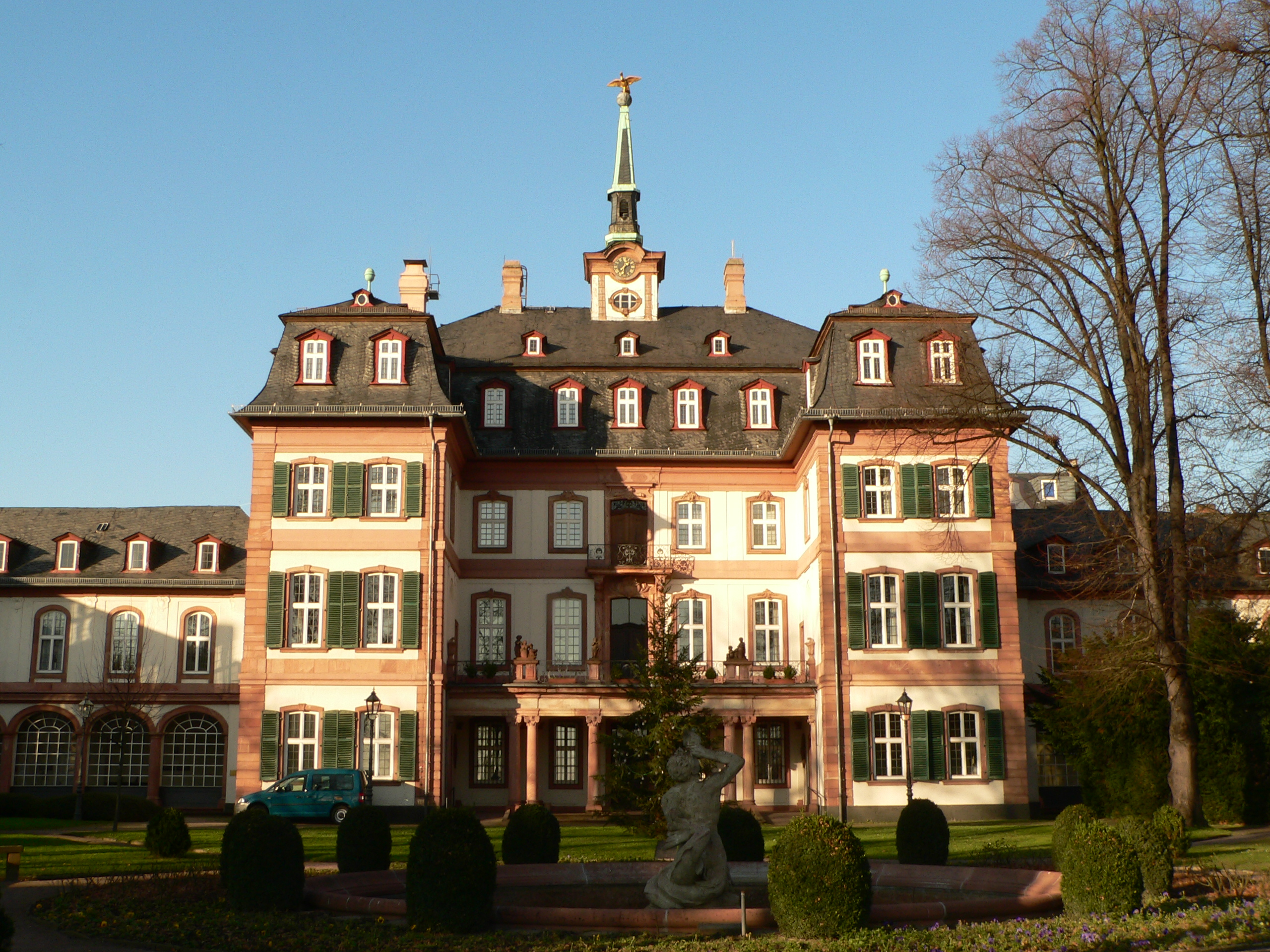 Gartenseite des Bolongaroplastes, Mittelbau